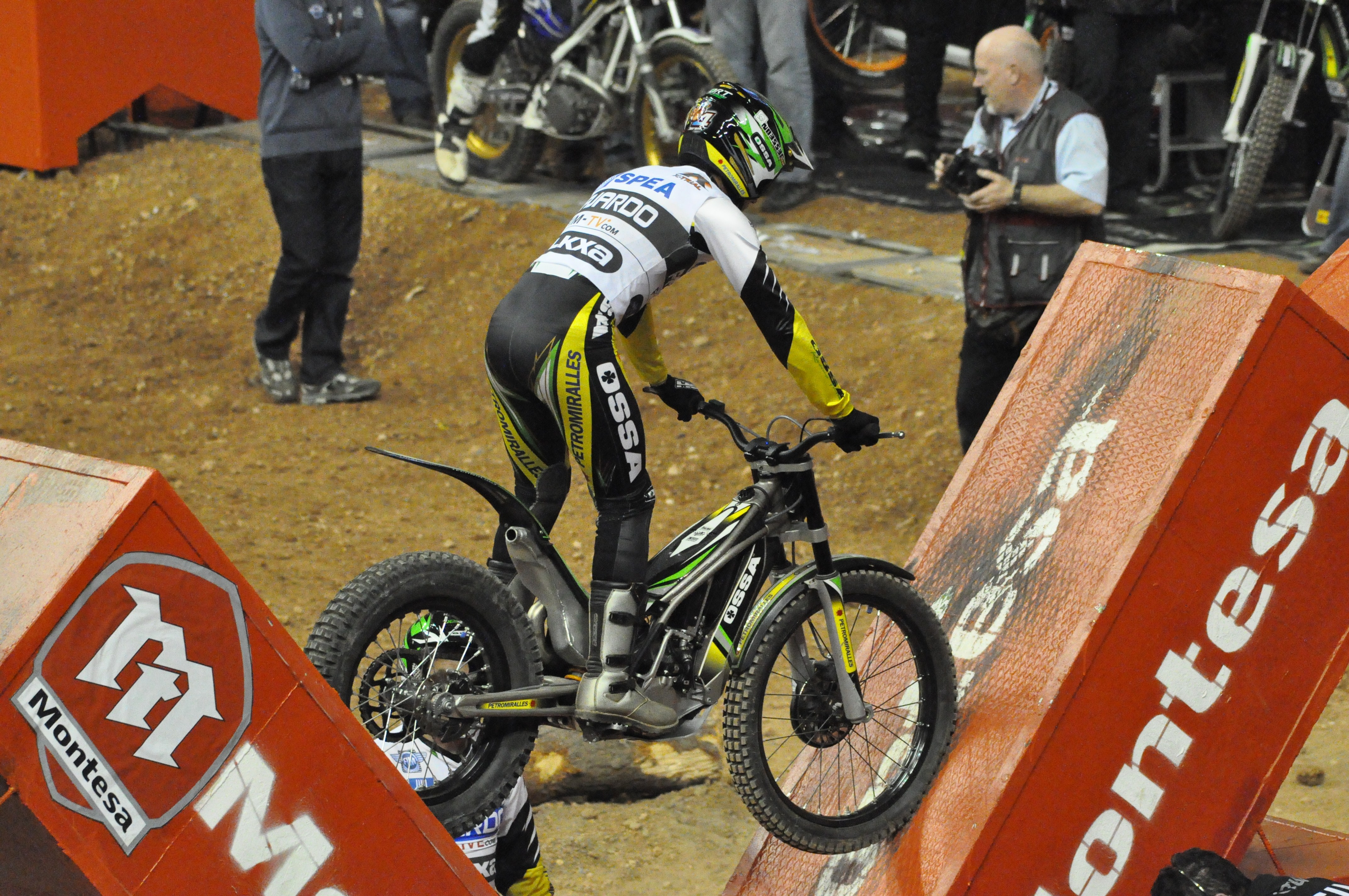 trial indoor de barcelona-2011